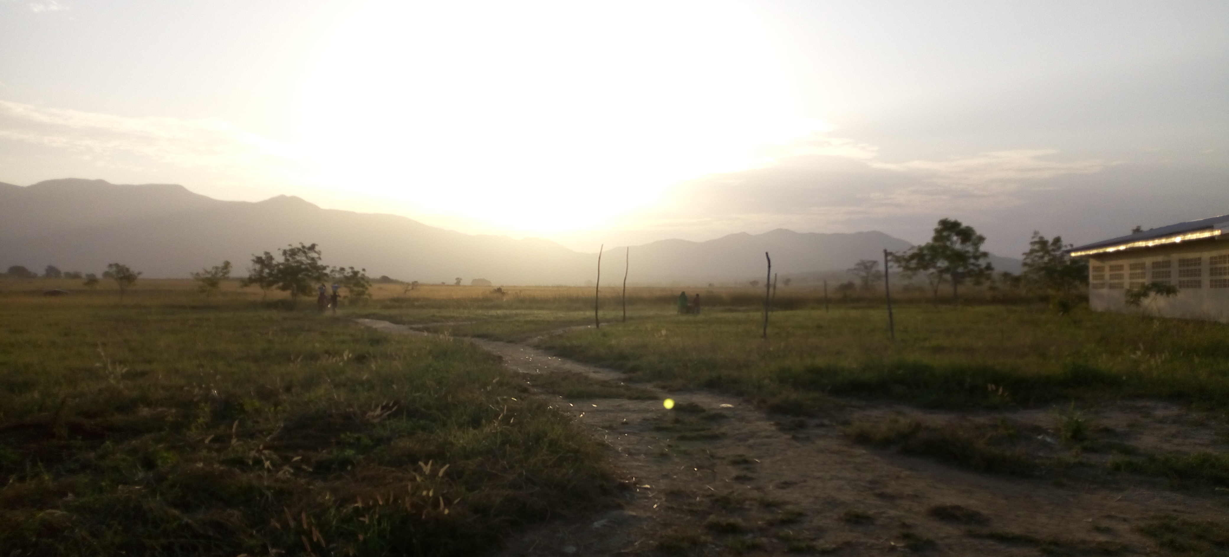 Le couché de soleil à djalingo dans l'arrondissement de Poli